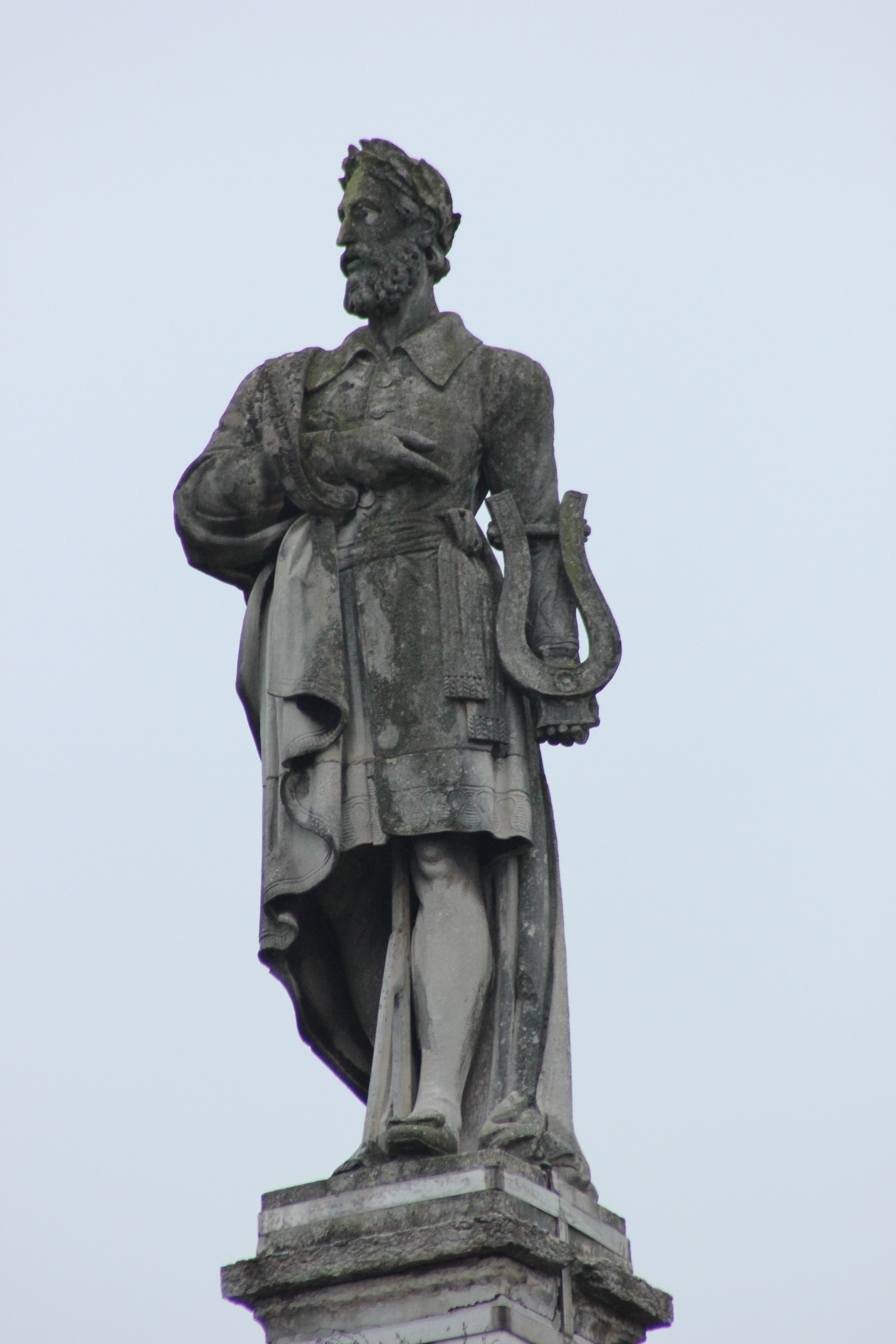 Паметник на Лудовико Ариосто във Ферара.